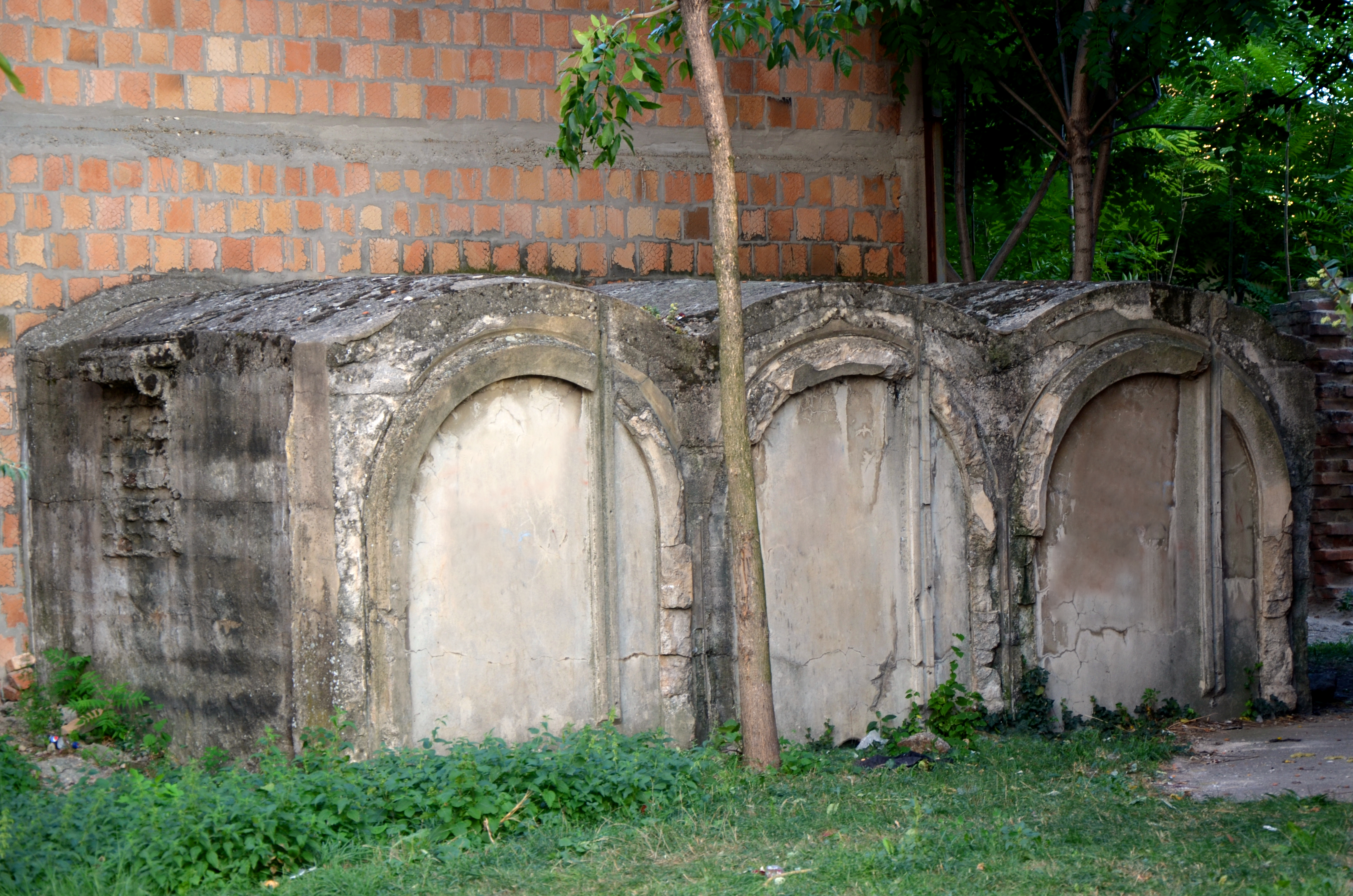 Tri bureta za vino na Trgu Zelena Pijaca broj 11 u Vršcu